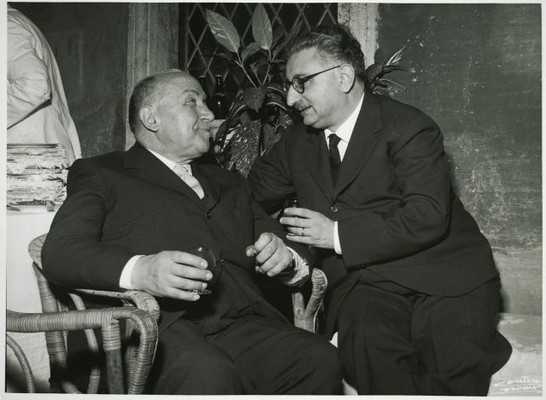 Ricevimento offerto ai delegati del Movimento Europeo a Castel Sant'Angelo